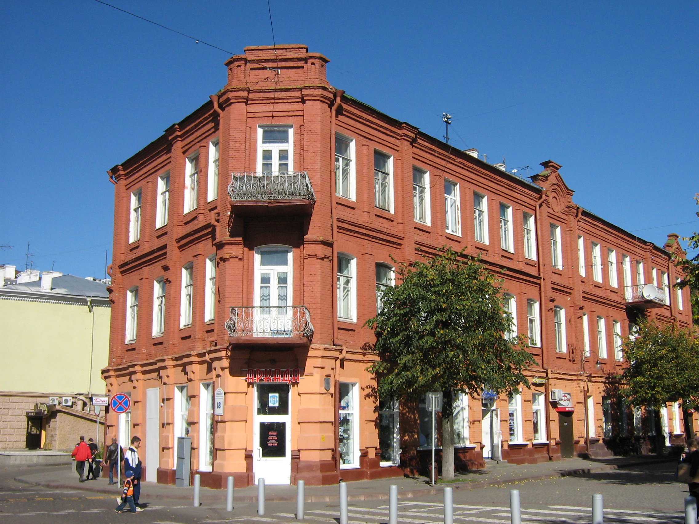 Lepeshinskogo str.